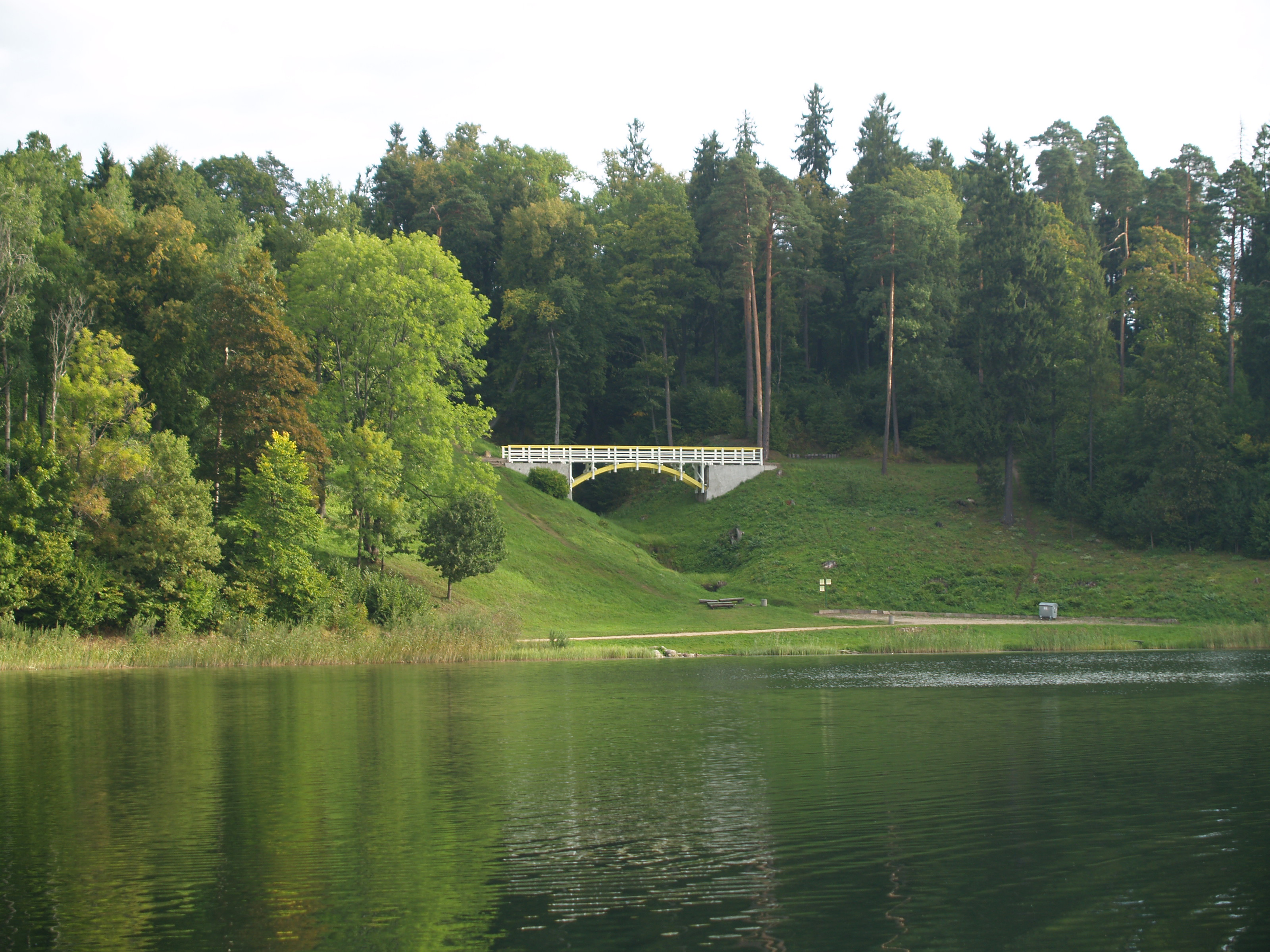 Alūksne Päikese Sild